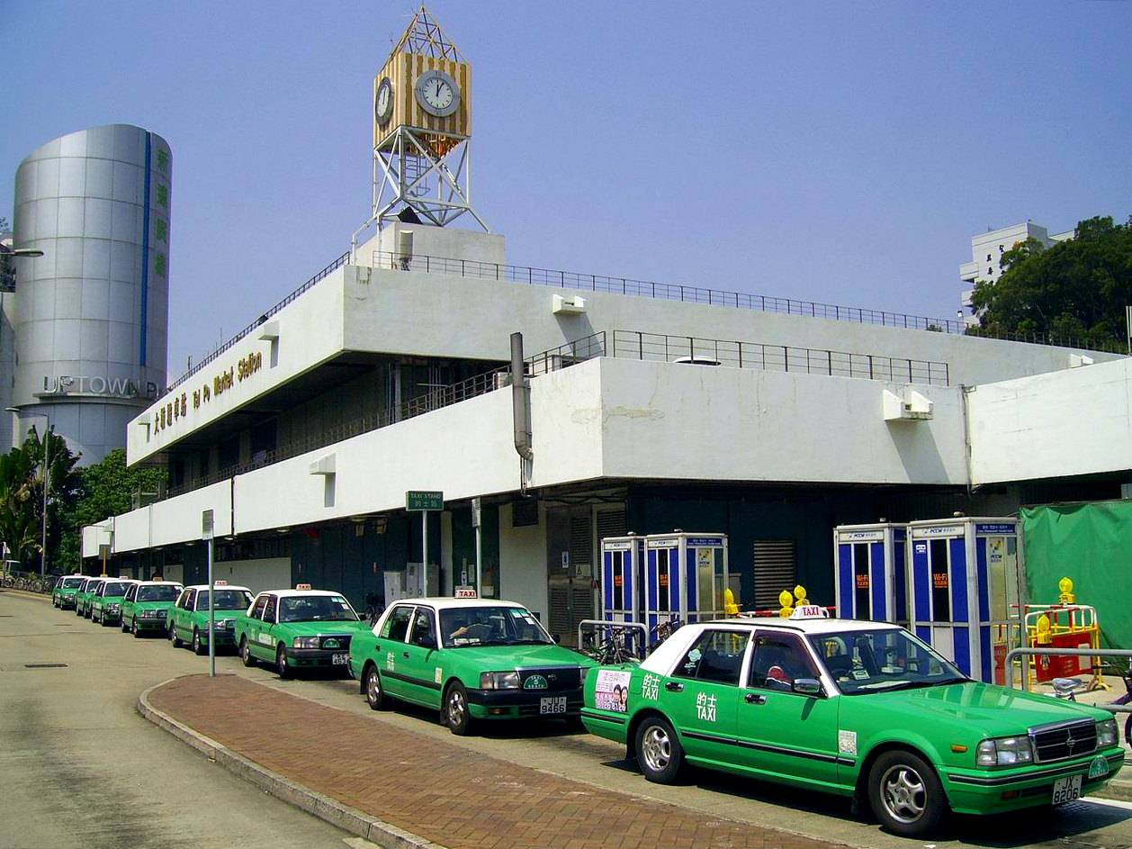 港鐵大埔墟站外觀